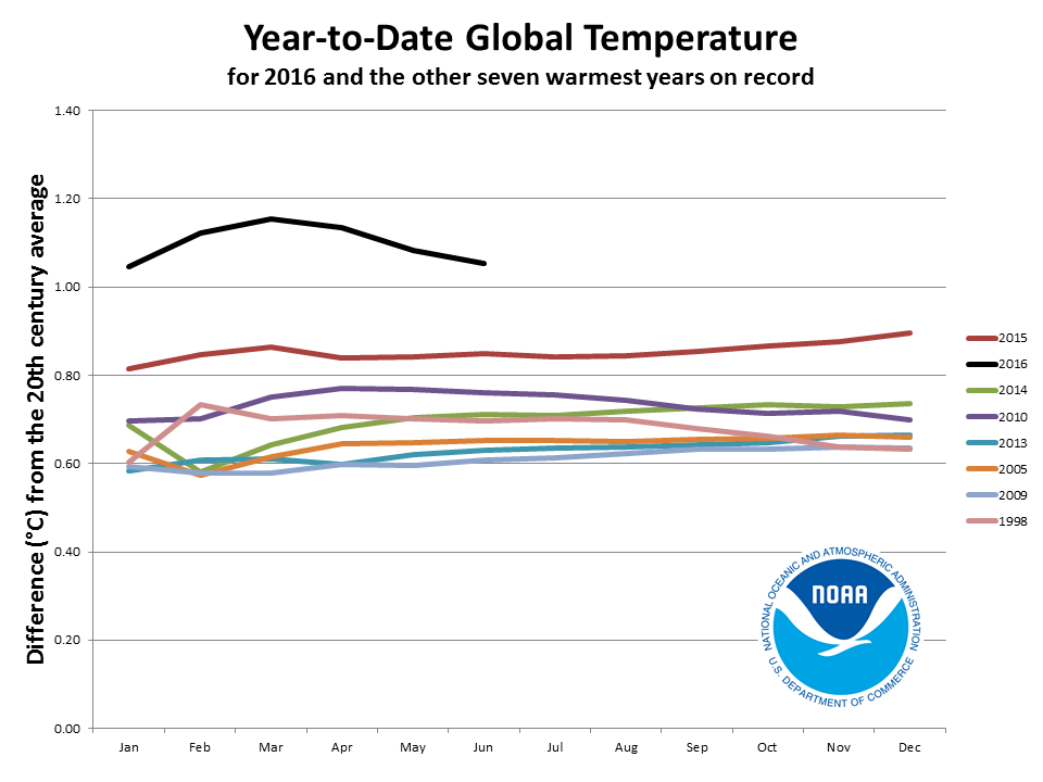 Year-to-year global temperature by NOAA, up till June 2016